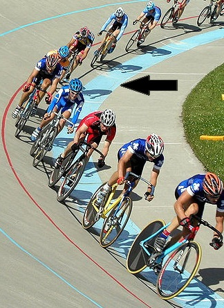 Track cycling, 2005 Canadian Track Cycling Championships, Calgary, AB, Canada.jpg. Mit Pfeil auf die Cote d'azur